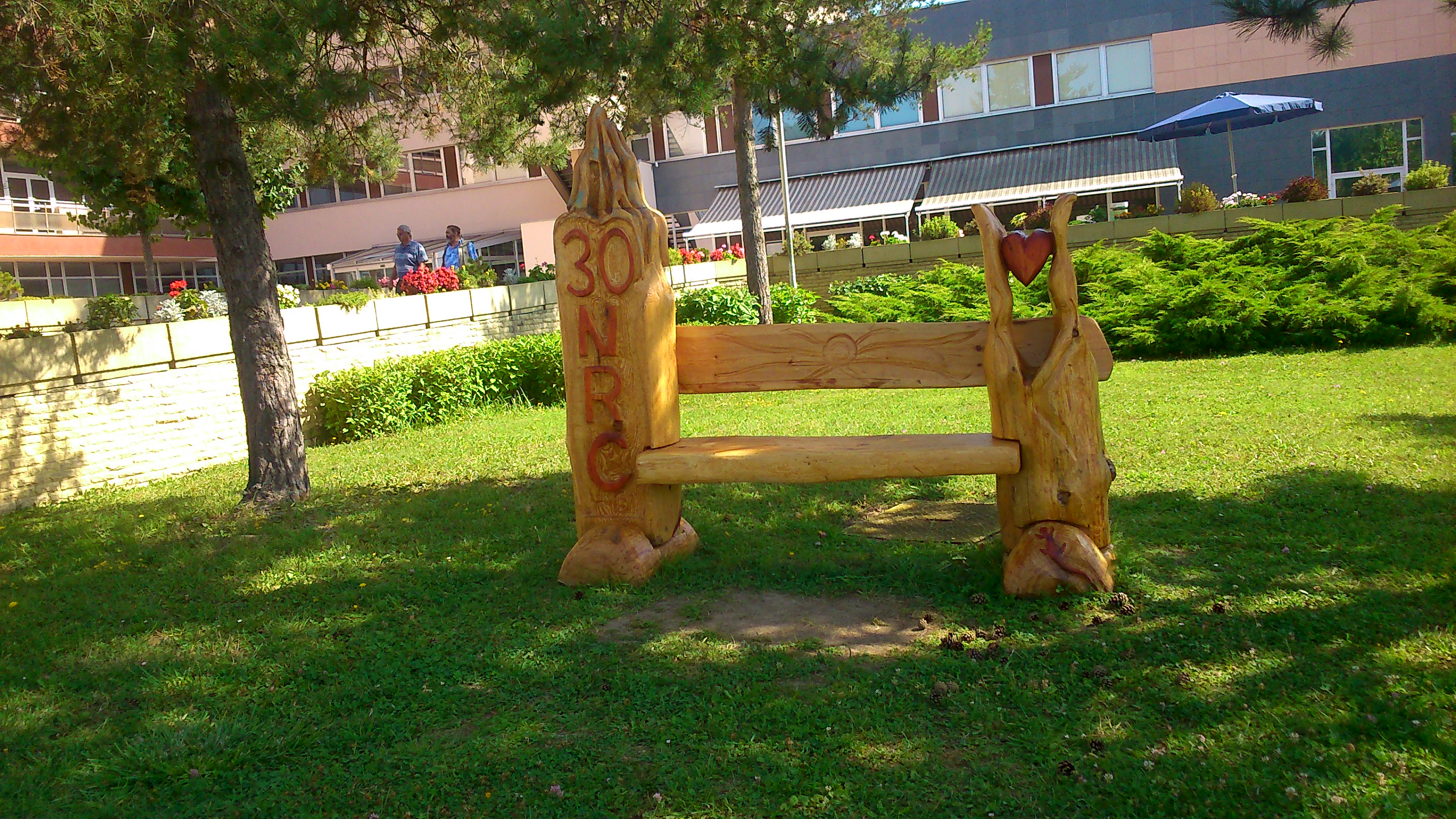 Park NRC